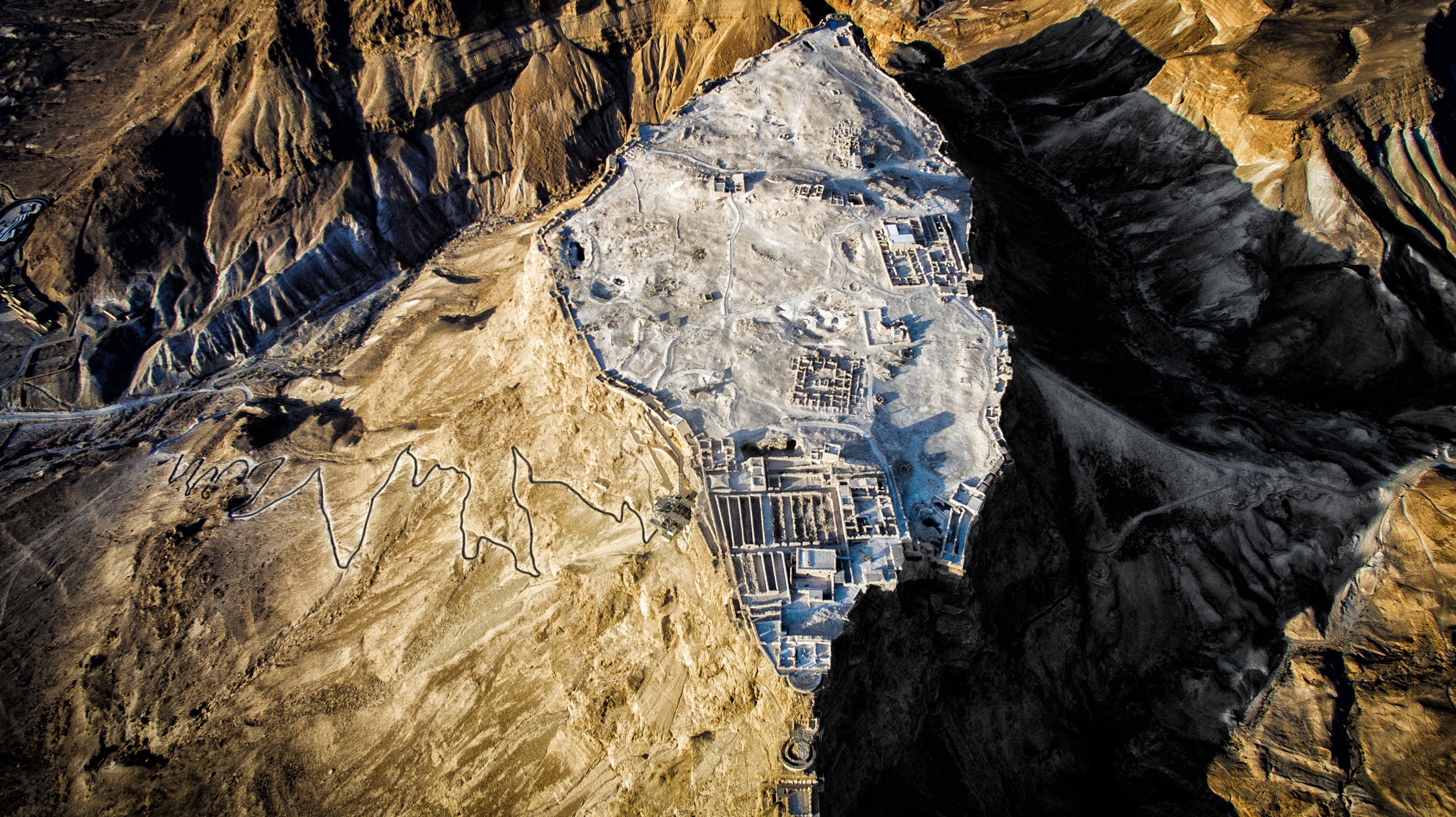 מצדה הוא מבצר עתיק על פסגתו של צוק מבודד, בשוליו המזרחיים של מדבר יהודה, המתנשא לגובה של 63 מטרים מעל פני הים, וכ-450 מטרים מעל ים המלח שלמרגלותיו. הצוק נבחר על ידי המלך הורדוס לשמש כמקום מפלט ומצודה מלכותית ועל פסגתו השטוחה נבנו ארמונות מפוארים, מבני ציבור ותענוגות. ביצורים הקיפו את המצוק ומערכות לאיסוף ואגירת מים הבטיחו אספקה שוטפת לכל אורך השנה. על פי יוסף בן מתתיהו, על מצדה עלה וצר, בשמונה מחנות מצור, הלגיון העשירי הרומאי ולאחר קרבות נואשים על חומות המבצר ומשאפסה תקוות המורדים להסיר את המצור הם בחרו להתאבד ולא לסיים את חייהם כעבדים.